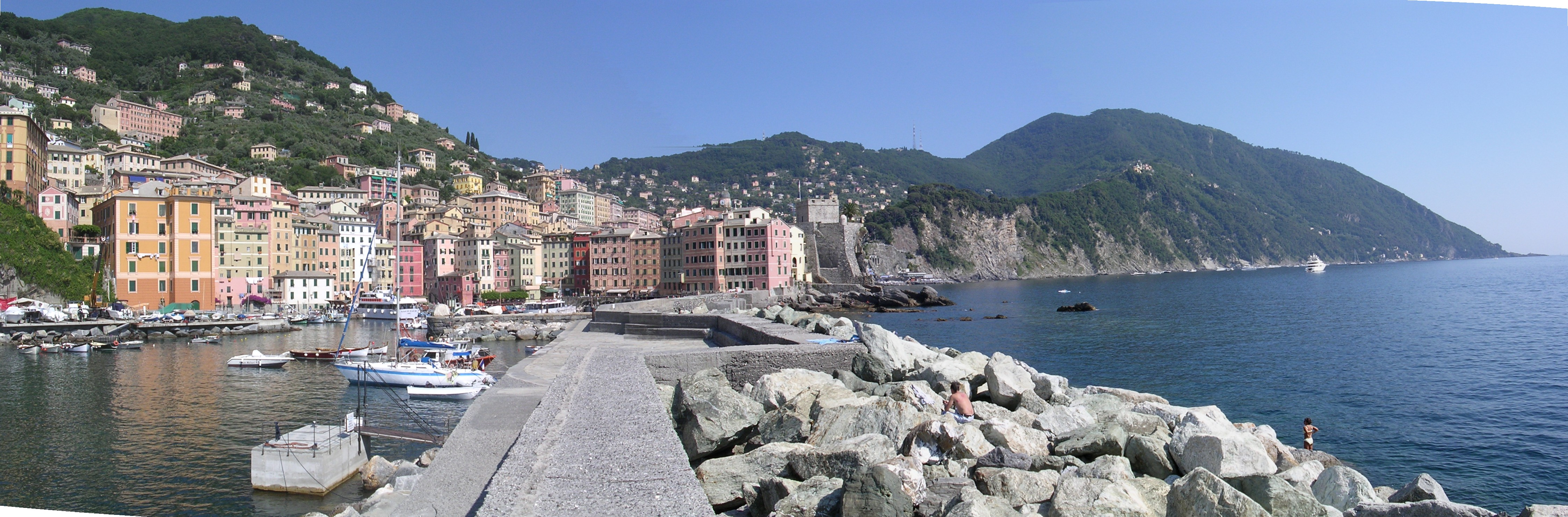 Camogli